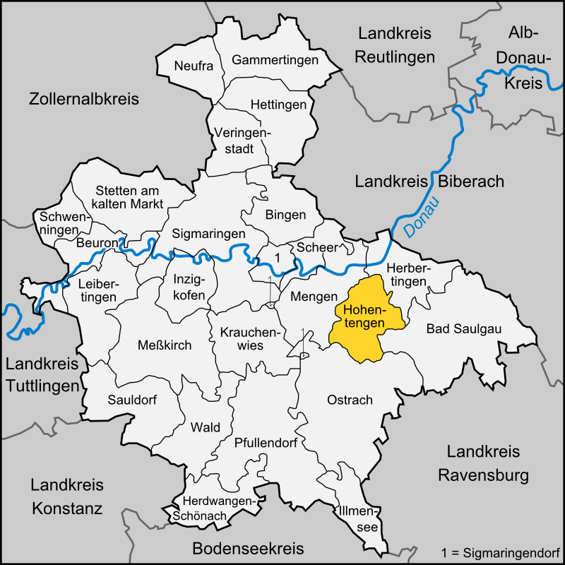 Karte der Gemeinde Hohentengen im Landkreis Sigmaringen